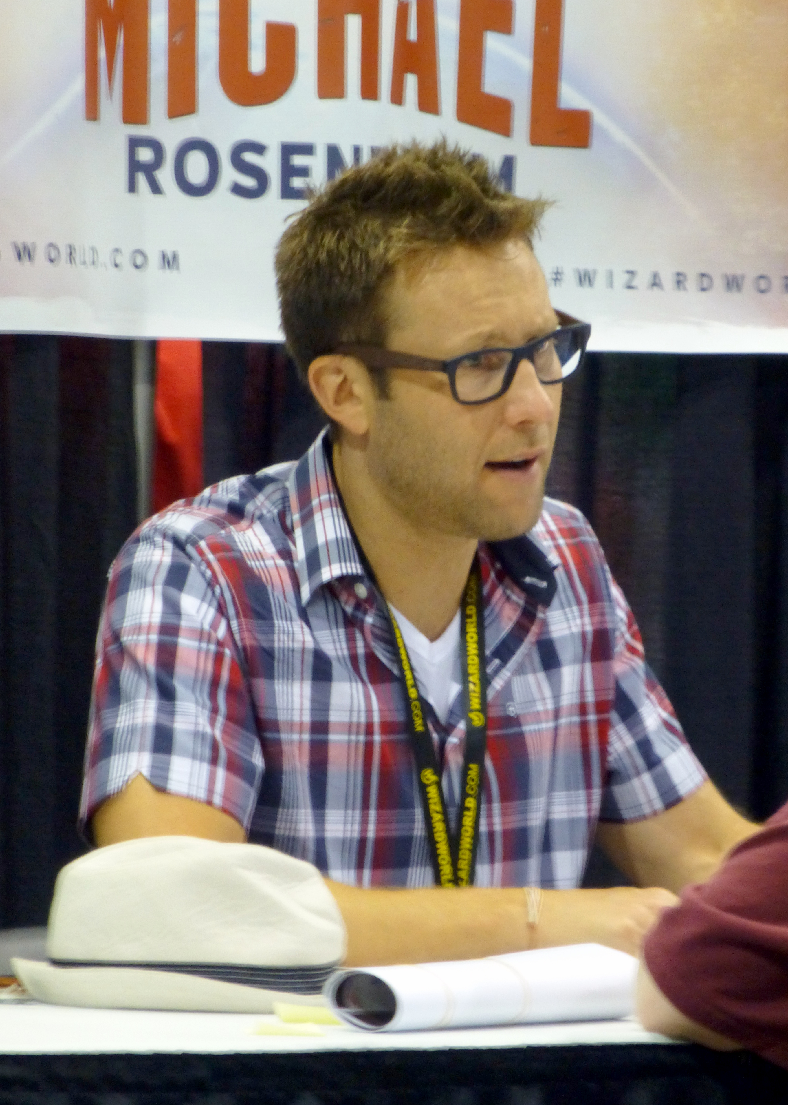 Michael Rosenbaum 01